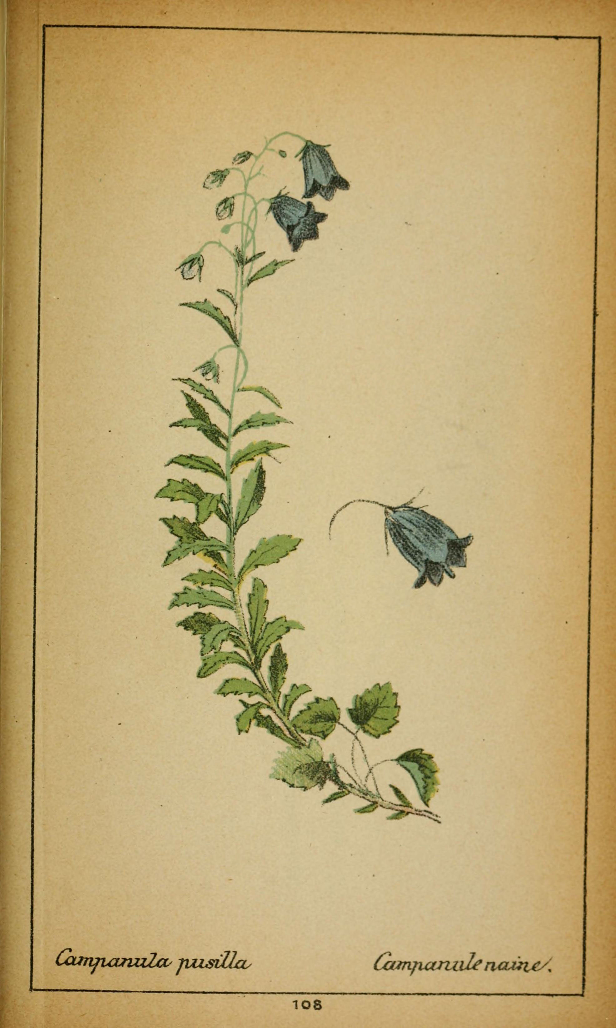 ^ y^r- '^ ■G ^■■^V' - ^.^.,^ '"*^S^.-'^^\i/i/. . r % v^^ ^âs 0:^i^np.curLVLiœ pzisiU/v Camftarud^ nainxy. 108